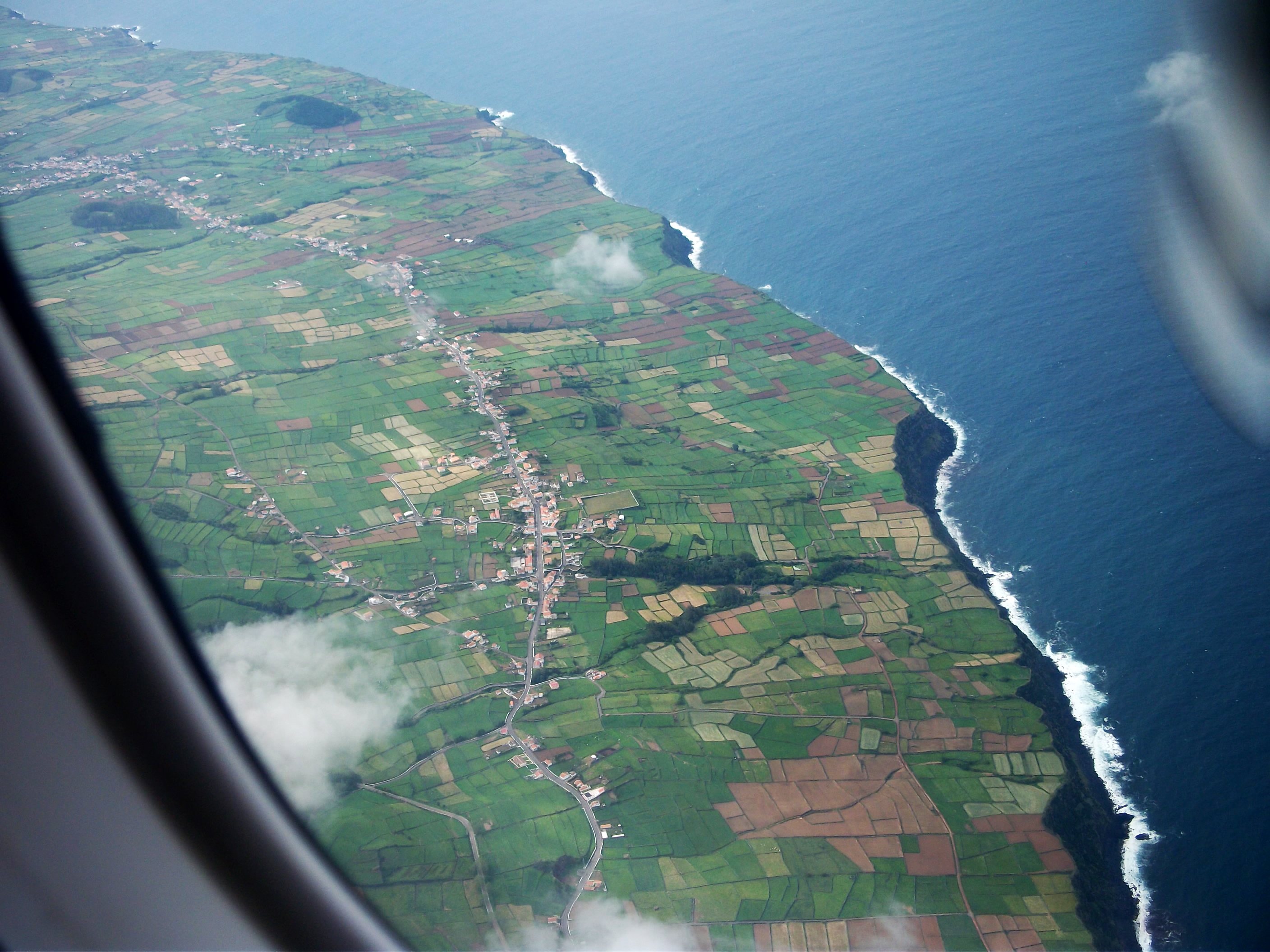 Vista da costa norte da ilha Terceira, Açores, Portugal